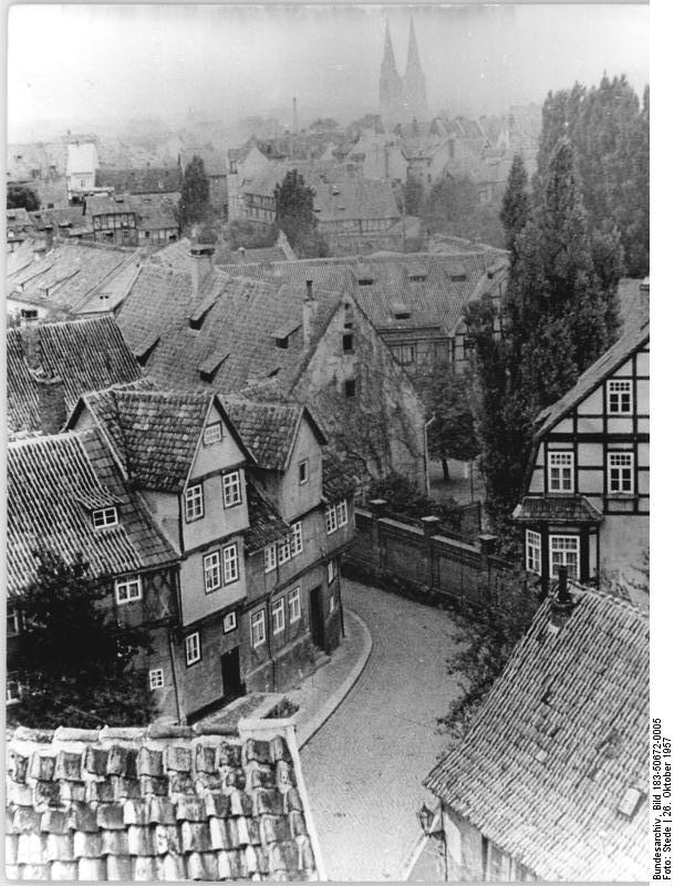 Quedlinburg, Blick auf die Stadt Zentralbild Stede 26.10.1957 Quedlinburg Blick von der Schloßterrasse auf die Stadt.